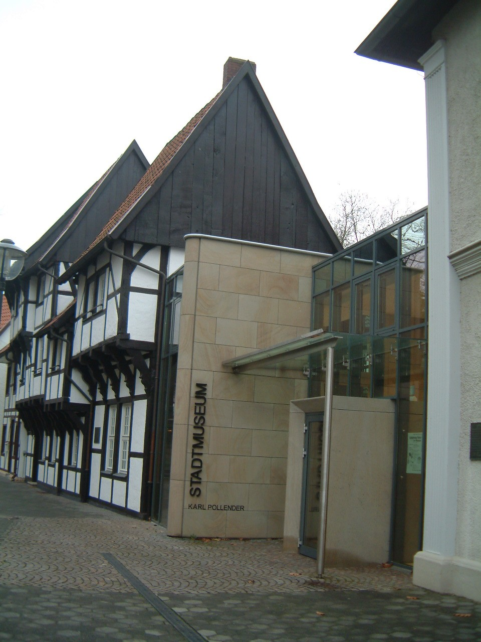 Wärmehäuschen und Eingang des Karl-Pollender-Museums auf dem Kirchplatz in Werne. Altes Amtshaus, ursprünglich zum Wohnhaus umgebaut ca. 1691 vom bischöflichen Amtsrentenmeister von Bruchhausen ca. 1800 wurde das Fachwerkhaus verputzt im 19. Jh. Privatbesitz ("Homann'sches Haus") 1962 vom Realschullehrer Karl Pollender als Heimatmuseum umgestaltet 1977-1980 Restaurierung, seitdem Stadtmuseum und historisches Archiv Von mir (Axel Brocke) selbst fotografiert am 28.11.2004. - GNU Free Documentation License: Vorlage:Bild-GFDL